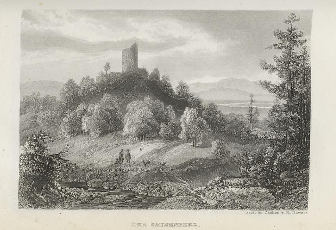 Lithographie der Sausenburg